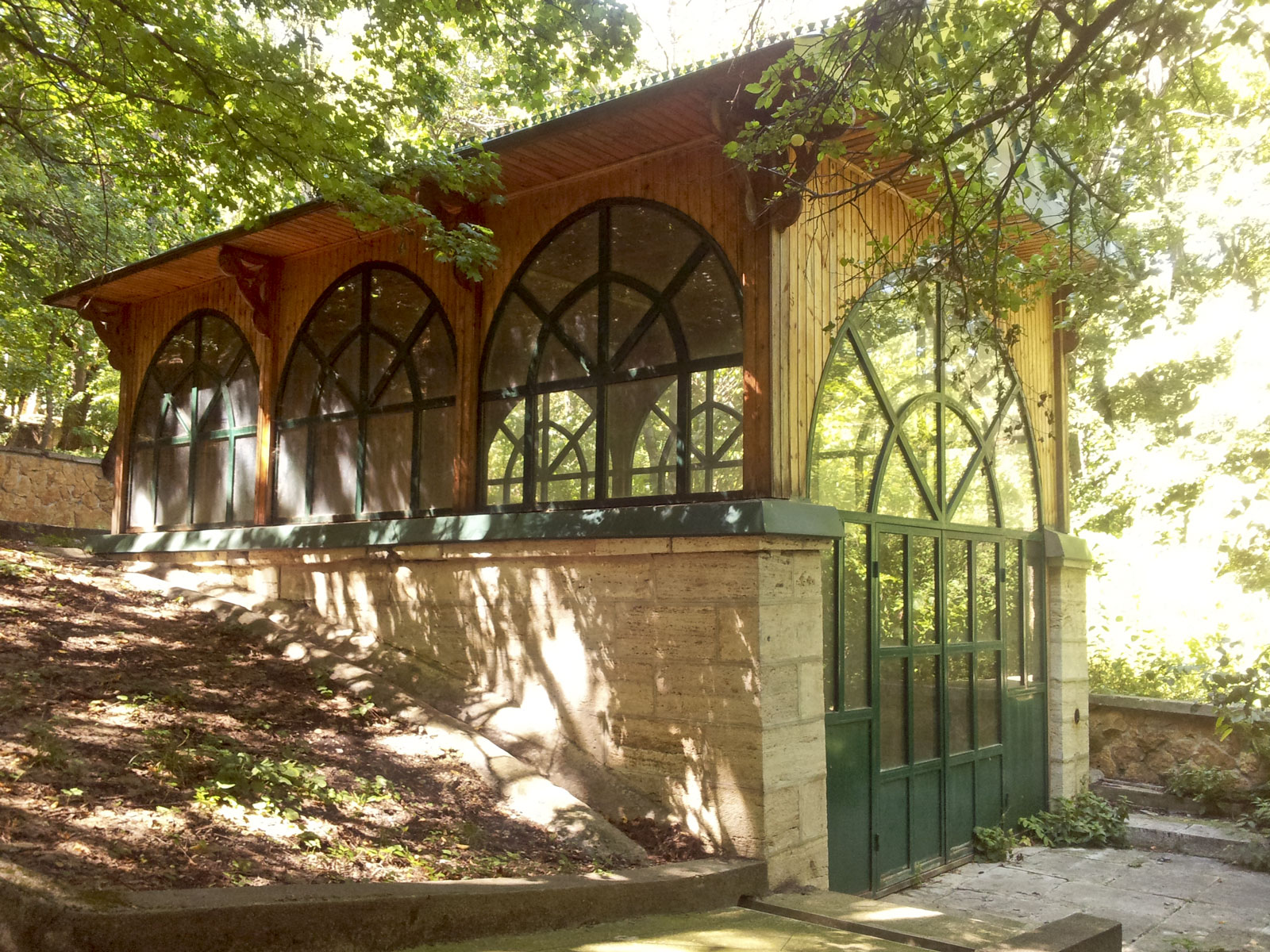 Бювет Мариинского источника